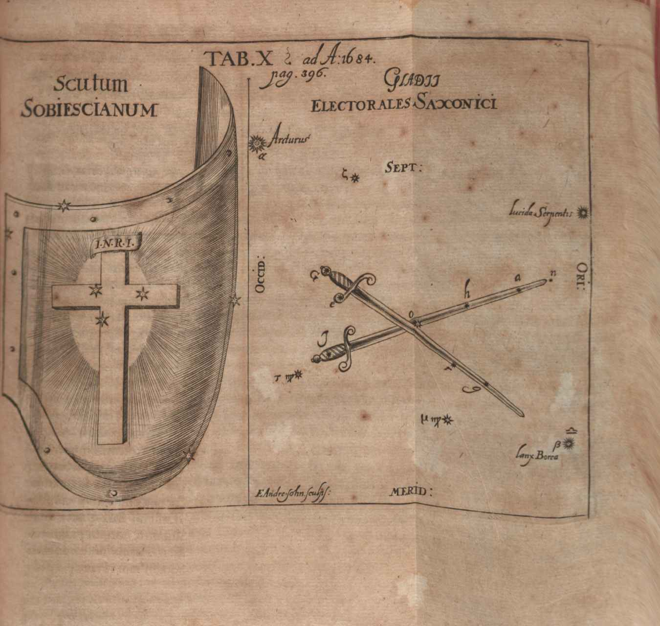 Illustration